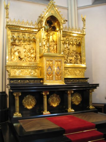 hoogaltaar hl hartkerk turnhout